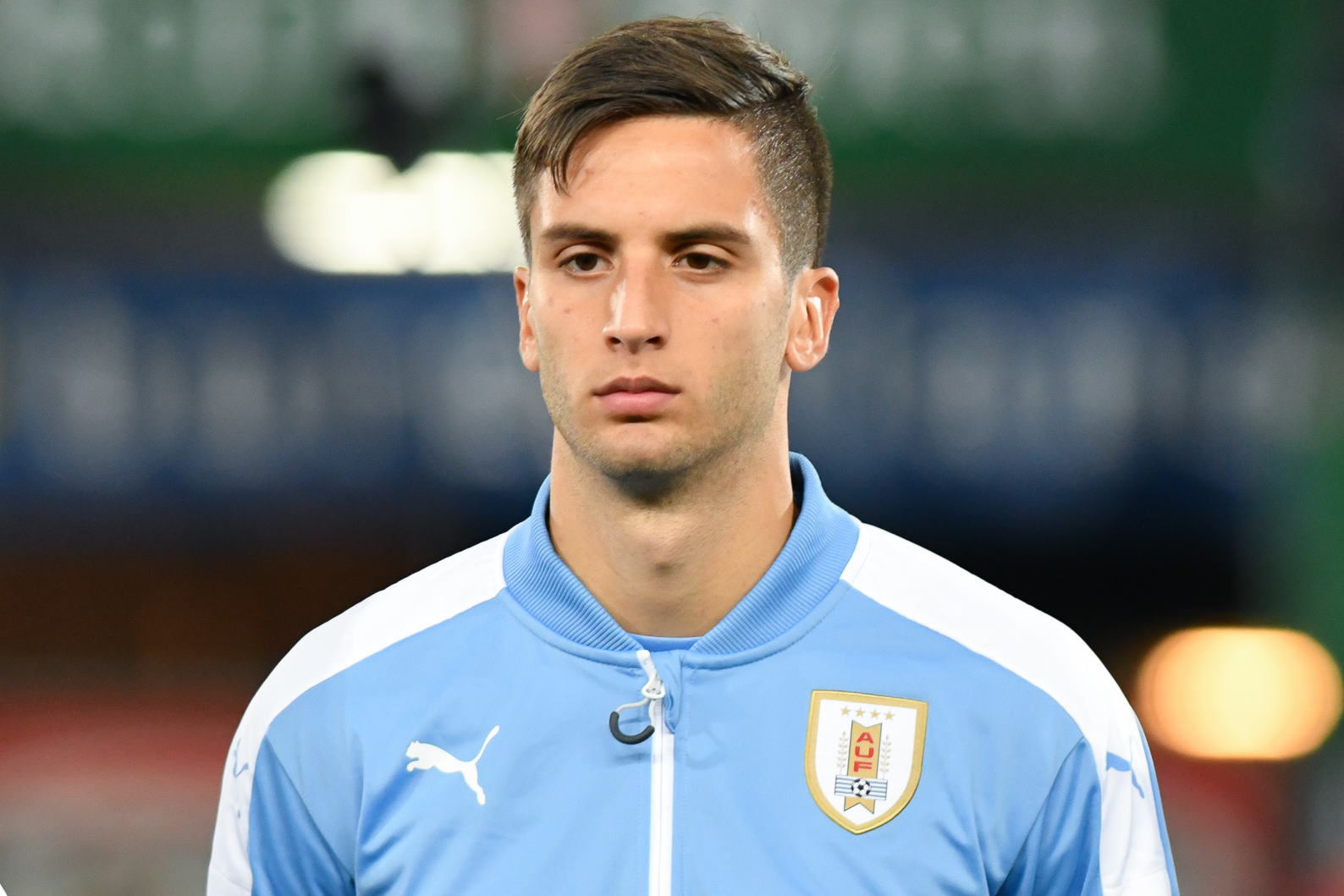 Wien, Österreich, 14.11.2017, Sport, Fussball, OEFB Freundschaftliches Laenderspiel - Österreich vs Uruguay. Bild zeigt Rodrigo Bentancur (URU).